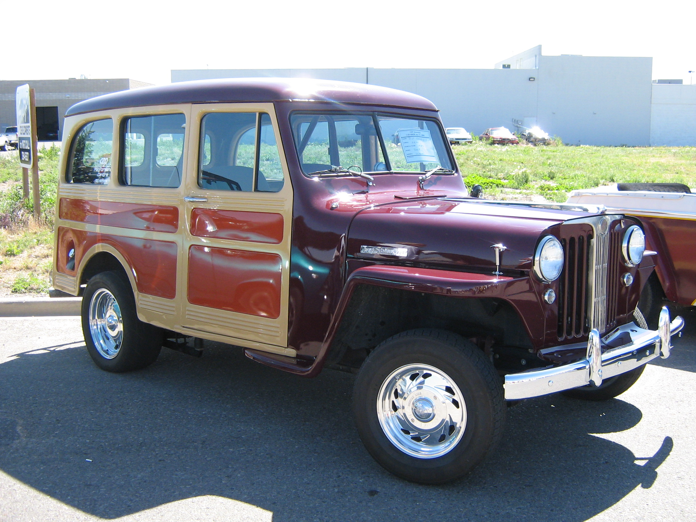 1947 Willys Wagon